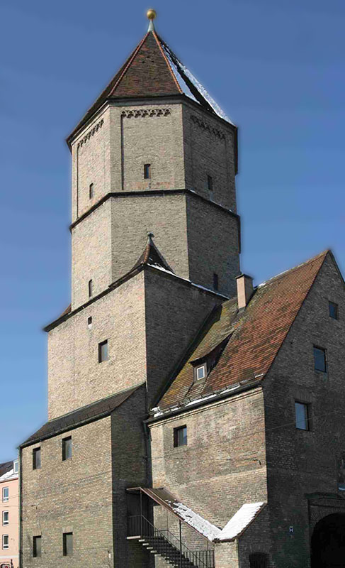 Jakobertor Augsburg im Februar 2009